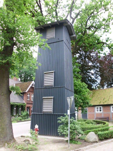 Dies ist der Feuerwehr-Schlauchturm Salzhausen aus dem Jahre 1870/80.